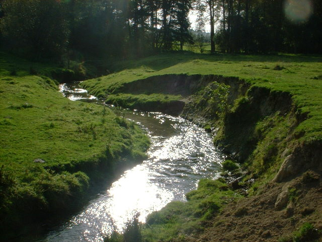 zelf gemaakte foto De Eyserbeek in Limburg in de buurt van Eys.